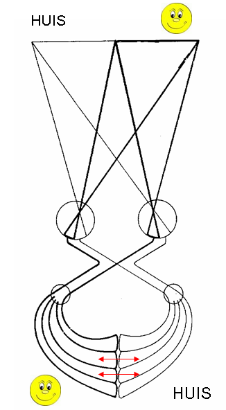 Anatomie van het visuele systeem: rechterveld stimulus (Smiley) projecteert naar linker hersenhelft, linkerveld stimulus (HUIS) naar rechter hersenhelft. De rode pijlen zijn zenuwbanen van de hersenbalk tussen de beide hemisferen